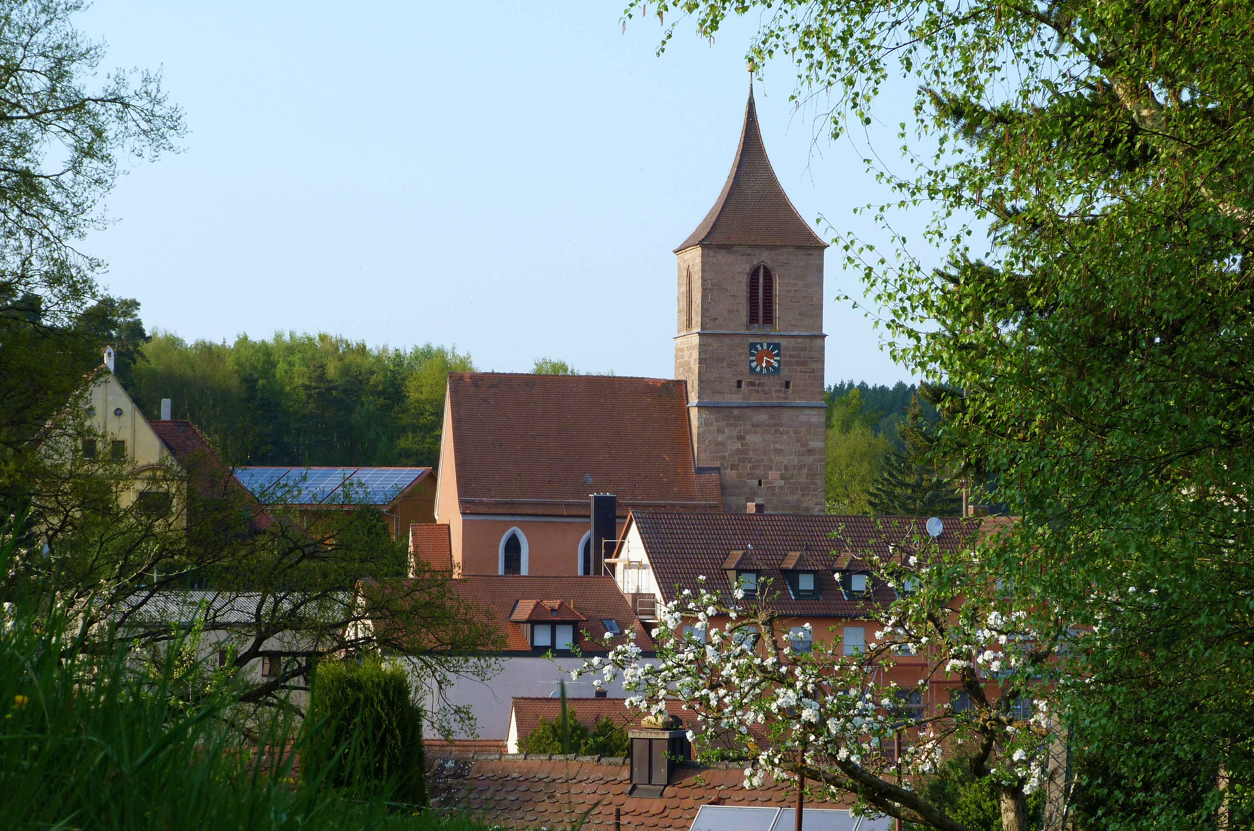 Im Frühling